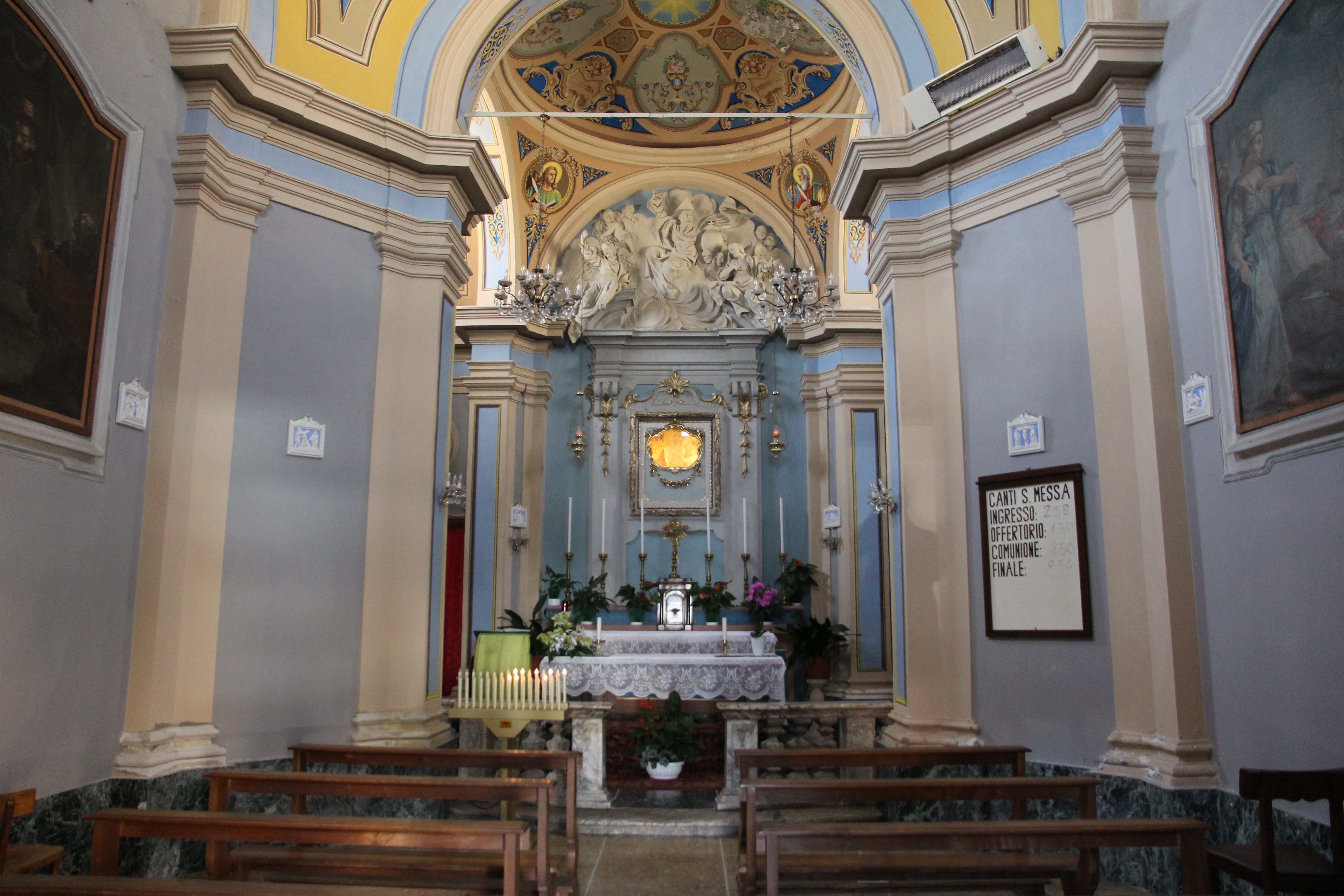 Predappio Alta, chiesa della Beata Vergine della Maestà